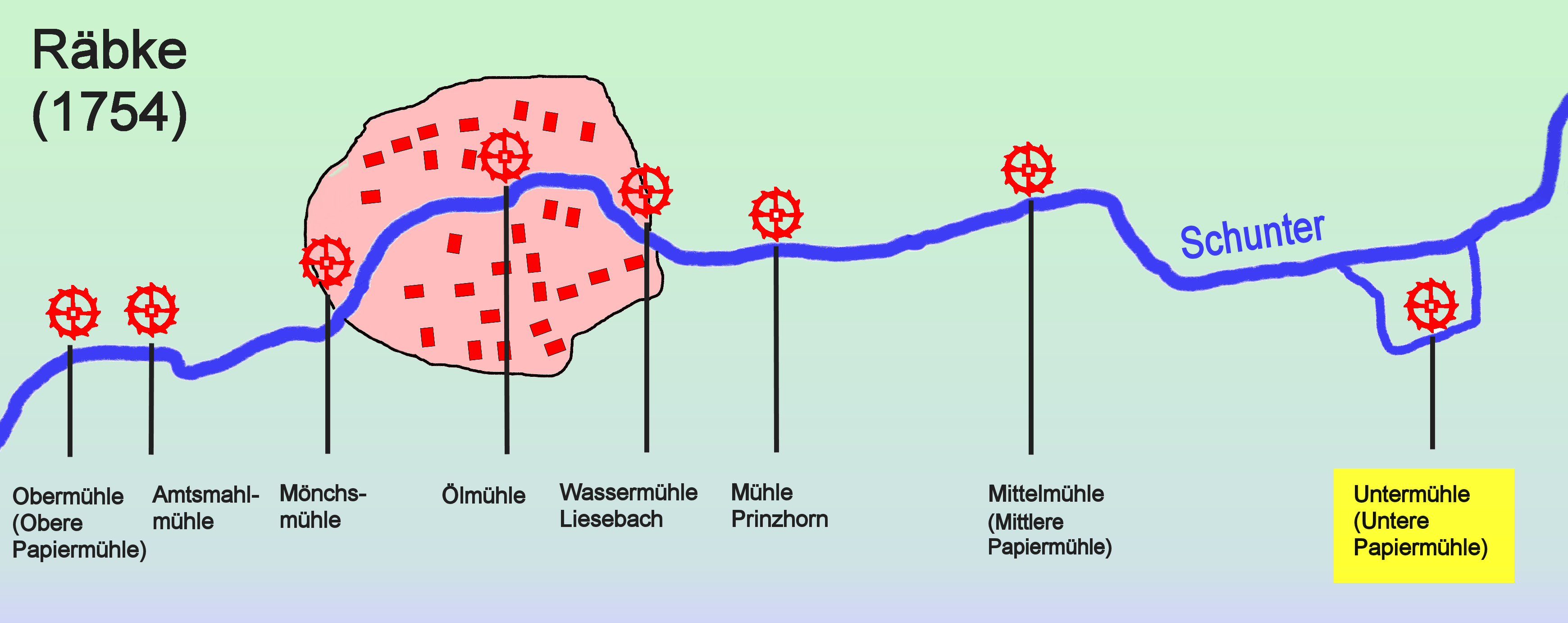 Untermühle von Räbke, Zeichnung nach der Braunschweigischen General-Landesvermessung von 1754